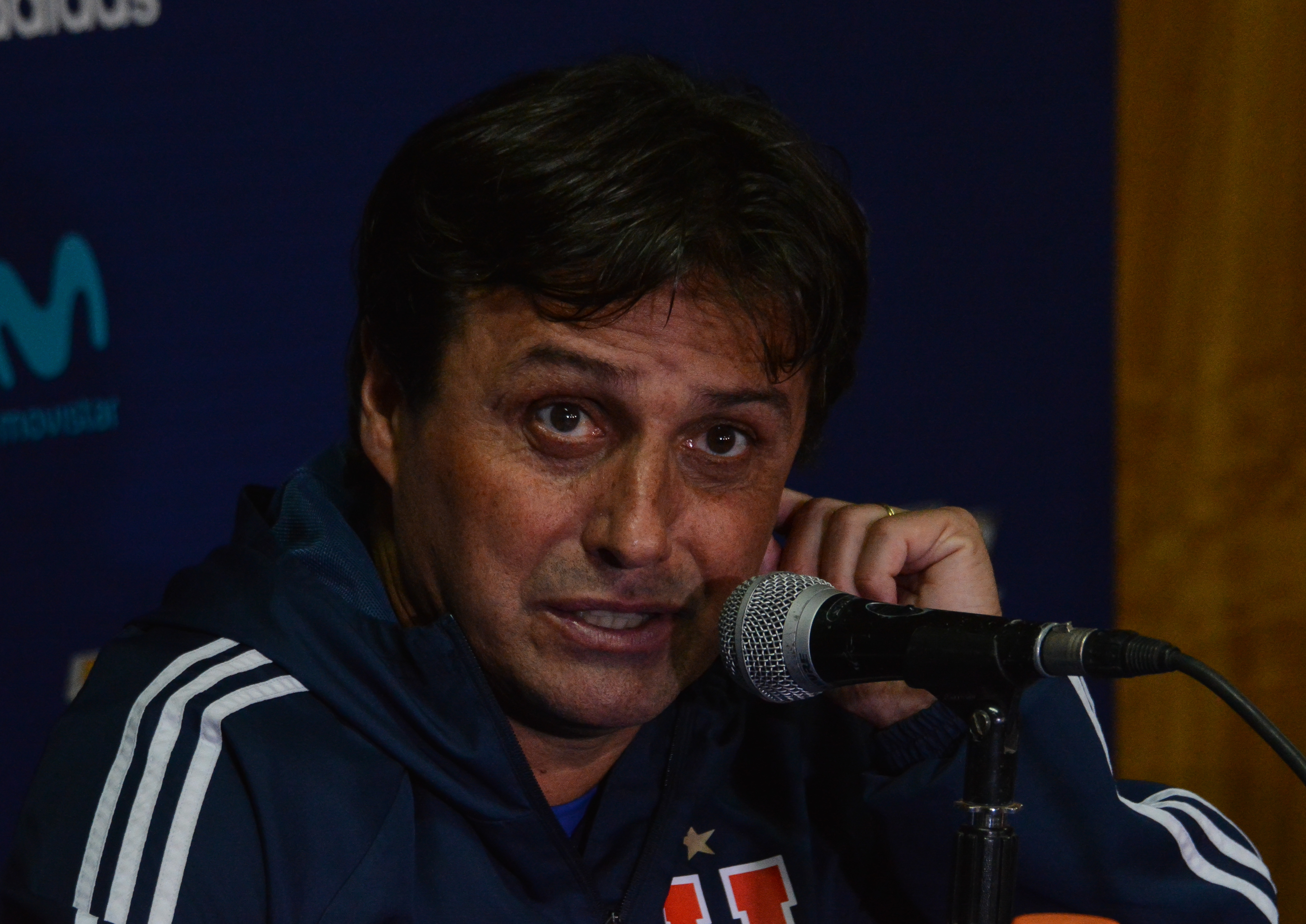 Universidad de Chile v Colo-Colo, Estadio Nacional, Santiago, Chile.